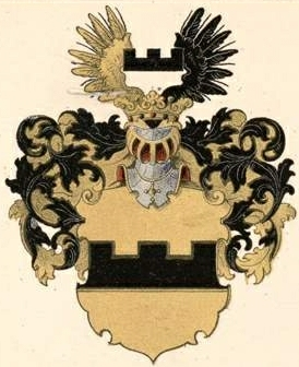 Löwenwolde suguvõsa vabahärravapp